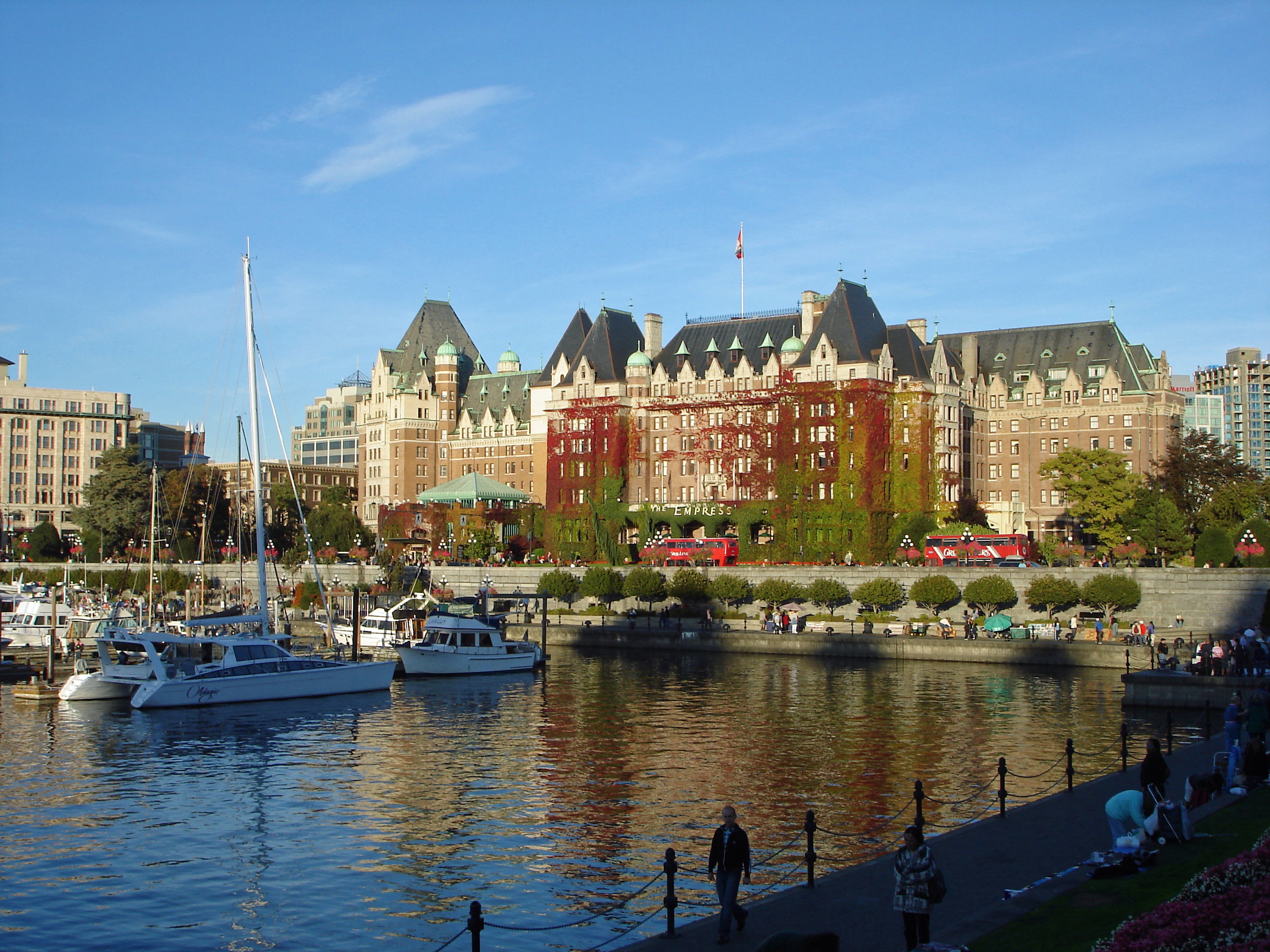 Kanada: The Empress in Victoria (British Columbia)